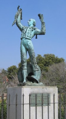 Pomnik Manolete